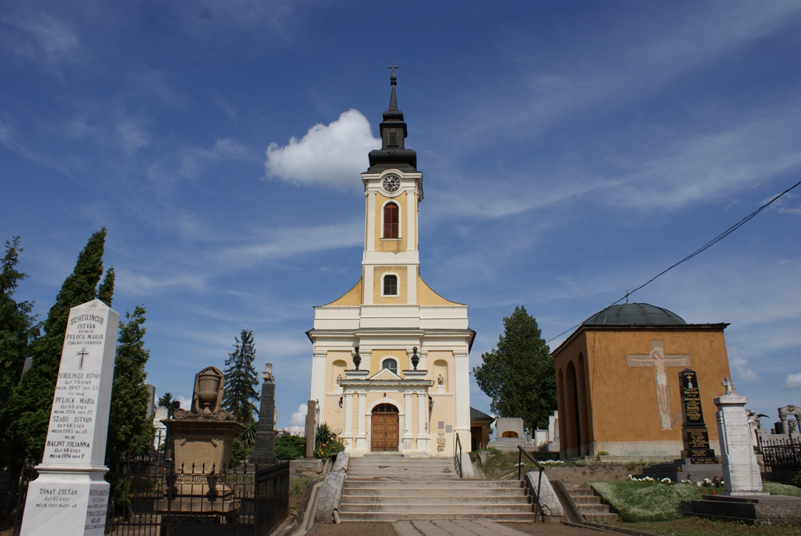 Szent Rókus-kápolna (Baja, Rókus utca 2.) This is a photo of a monument in Hungary, Identifier: 2095